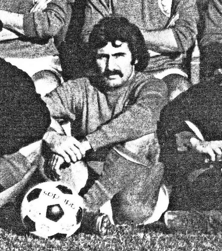 Il calciatore italiano Mario Scarpa al Perugia nella stagione 1974-75.